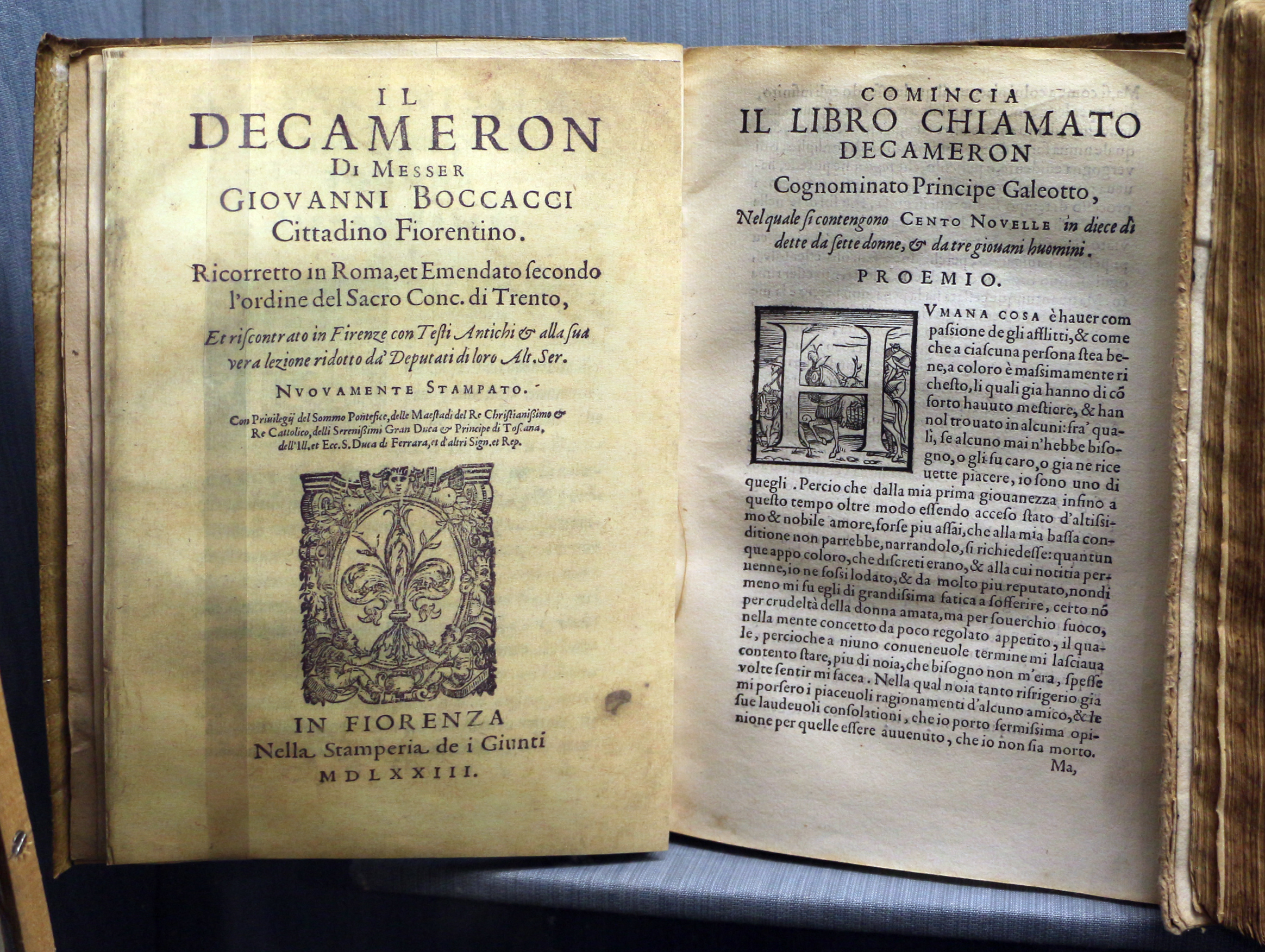 Biblioteca Marucelliana This is a photo of a monument which is part of cultural heritage of Italy.